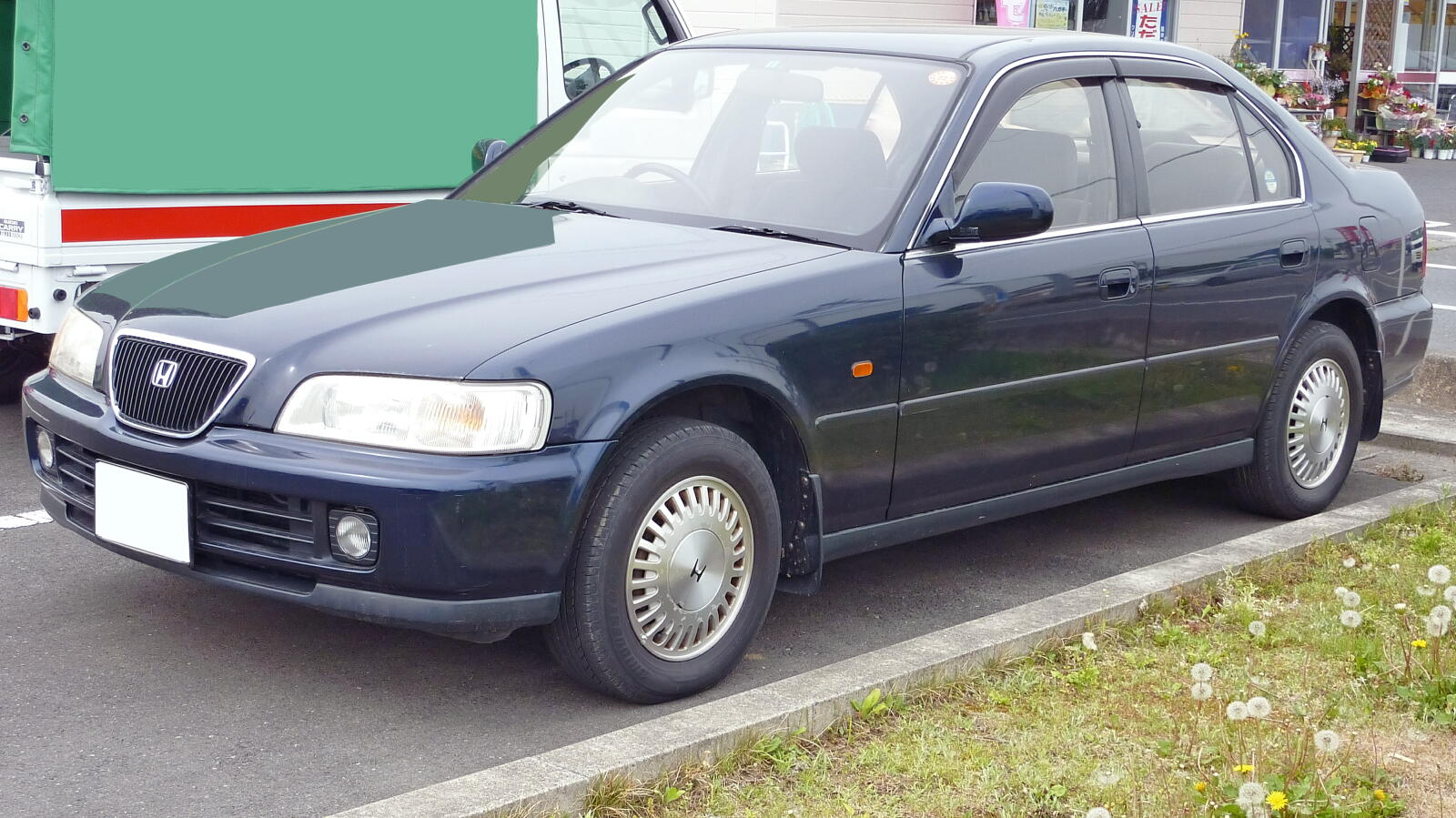 ホンダ・アスコット（2代目）